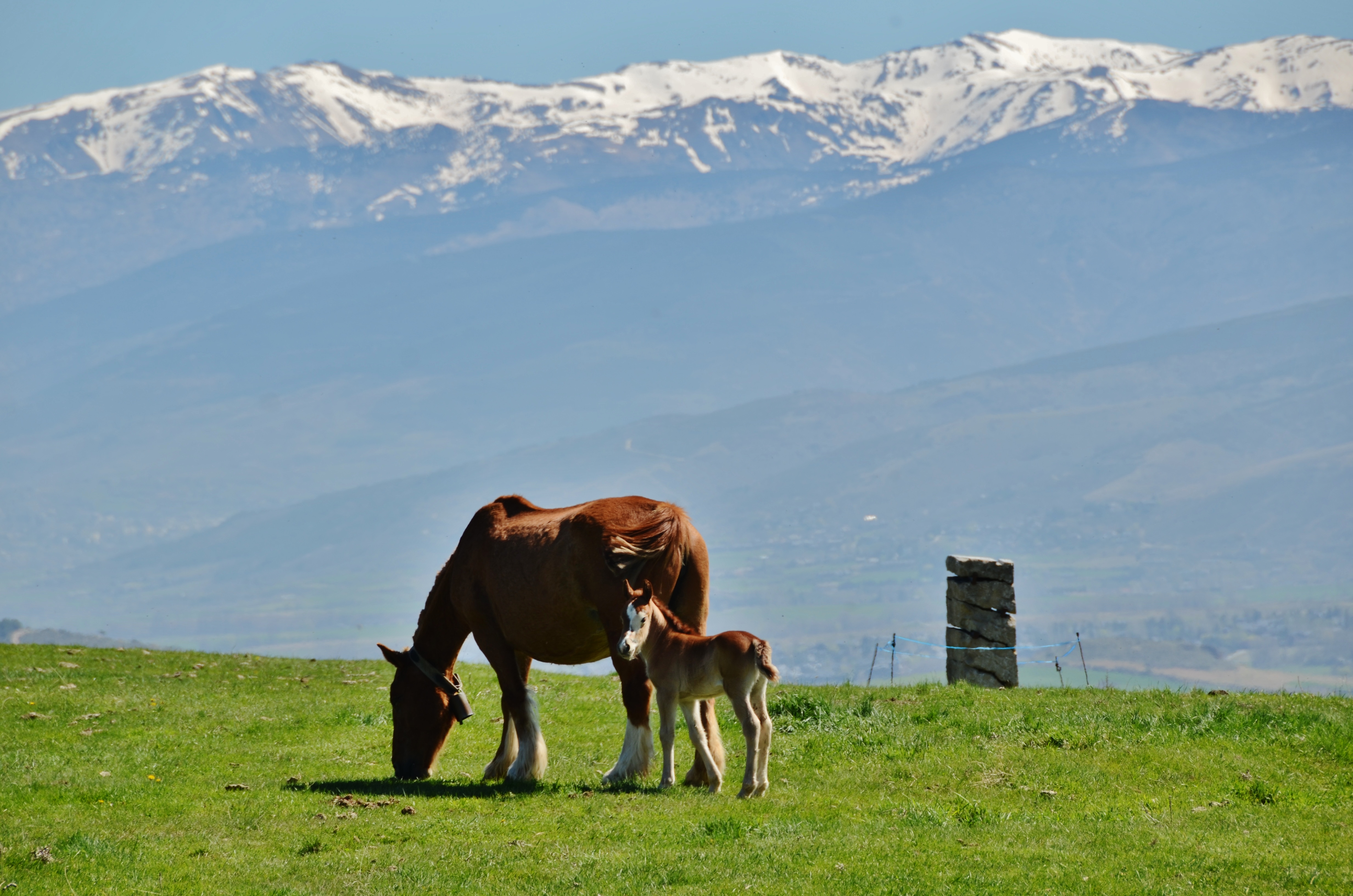 Cavalls pasturant a Pla de Nas i la Serra del Cadí, la Cerdanya This is a a photo of a natural area in Catalonia, Spain, with id: ES510202